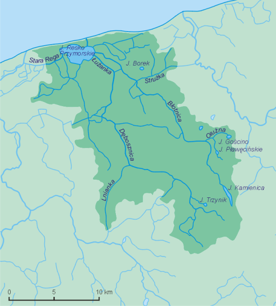 Dorzecze Błotnicy